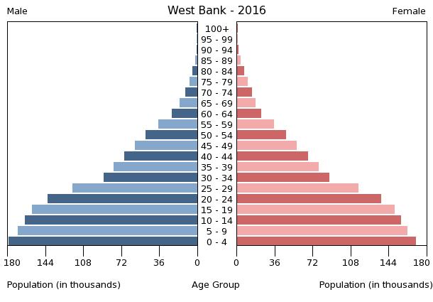 A population pyramid illustrates the age and sex structure of a country's population and may provide insights about political and social stability, as well as economic development. The population is distributed along the horizontal axis, with males shown on the left and females on the right. The male and female populations are broken down into 5-year age groups represented as horizontal bars along the vertical axis, with the youngest age groups at the bottom and the oldest at the top. The shape of the population pyramid gradually evolves over time based on fertility, mortality, and international migration trends.